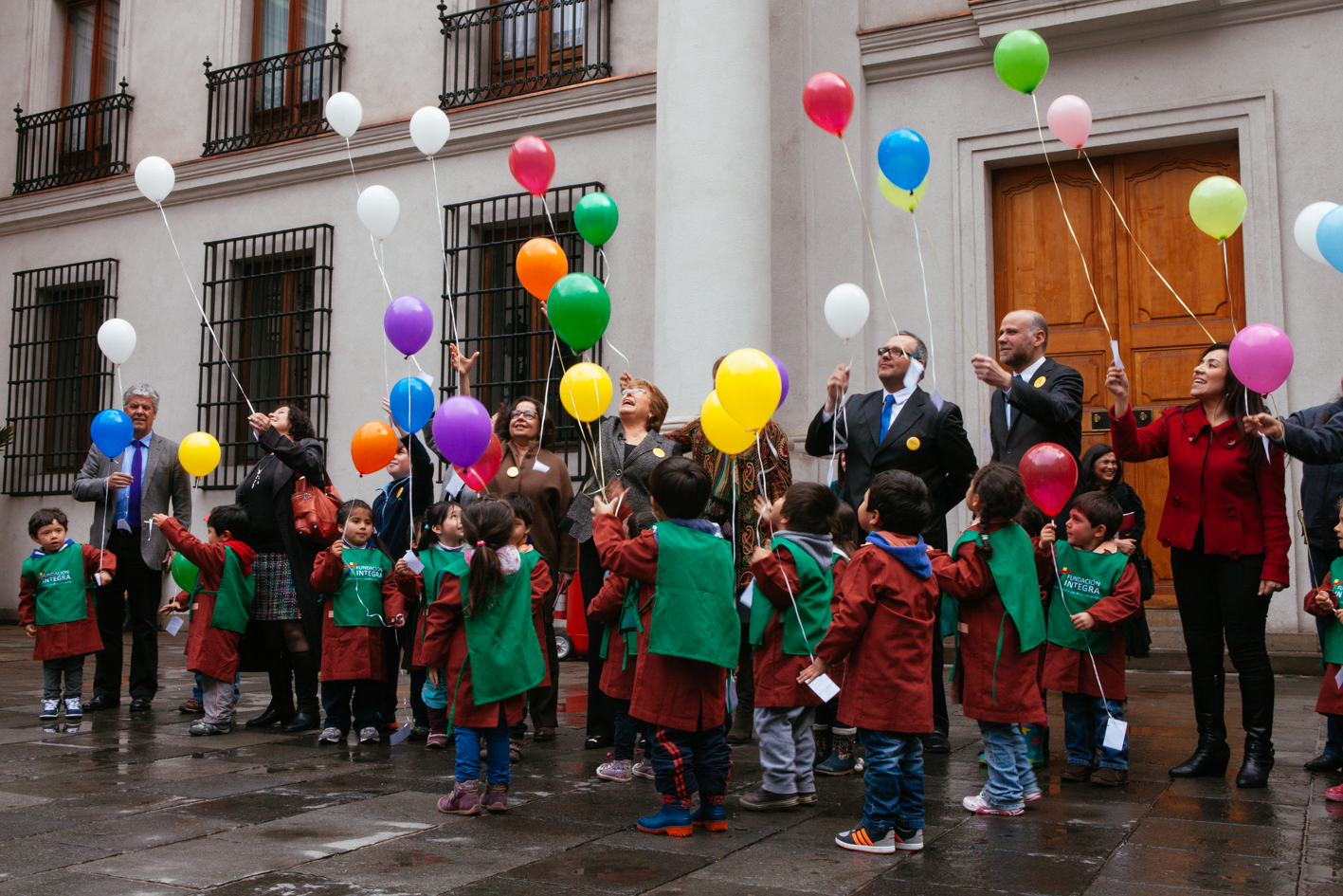 Ministro Álvaro Elizalde participa del lanzamiento de globos con poemas de Nicanor Parra.